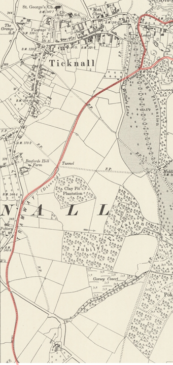 Ticknall Tramway on OS Map of 1901